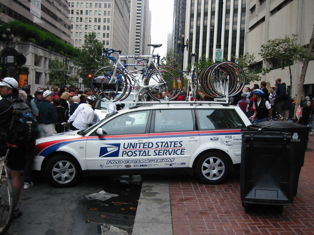 US Postal Car